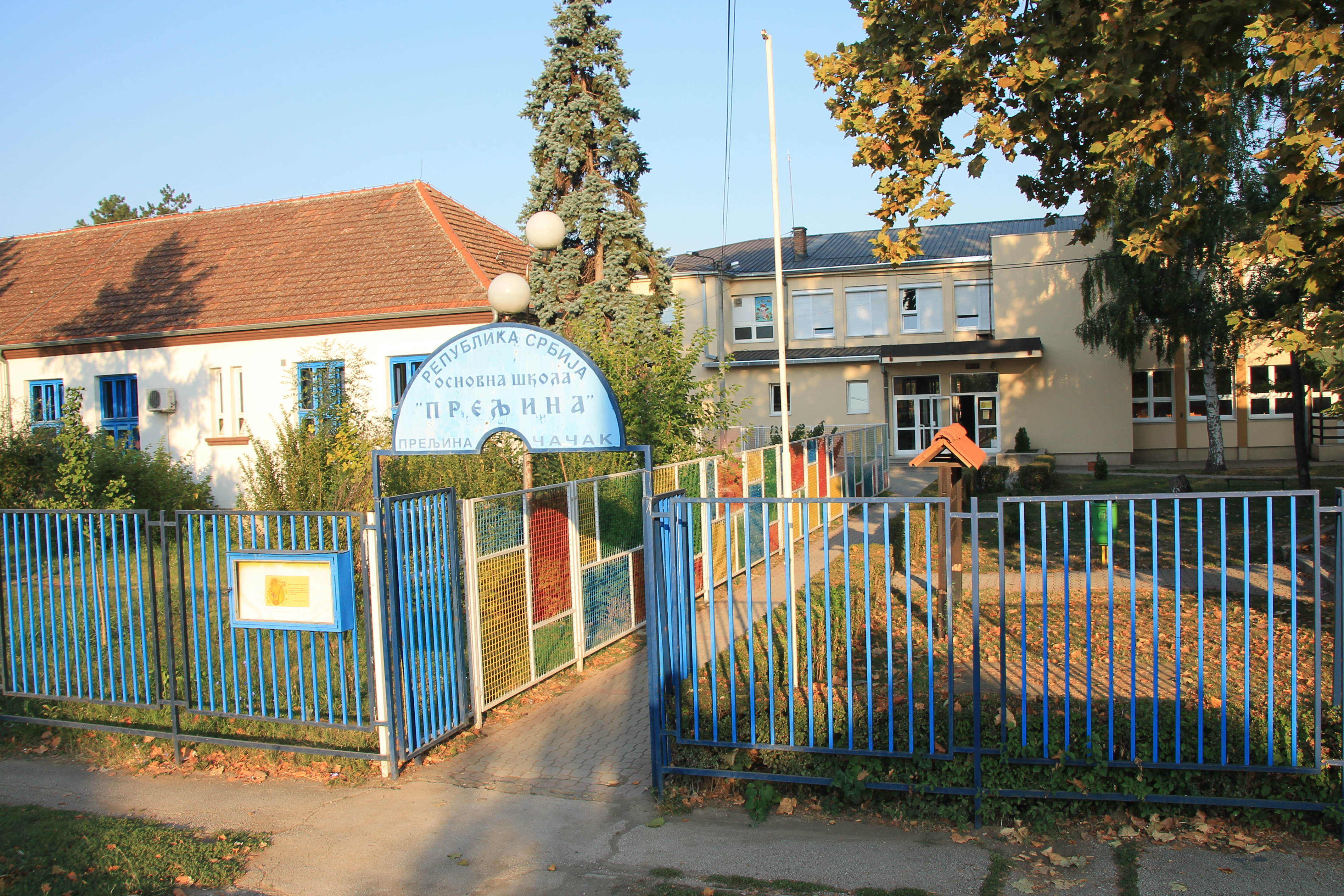 OŠ Preljina